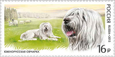 Серия «Фауна России. Служебные породы собак»